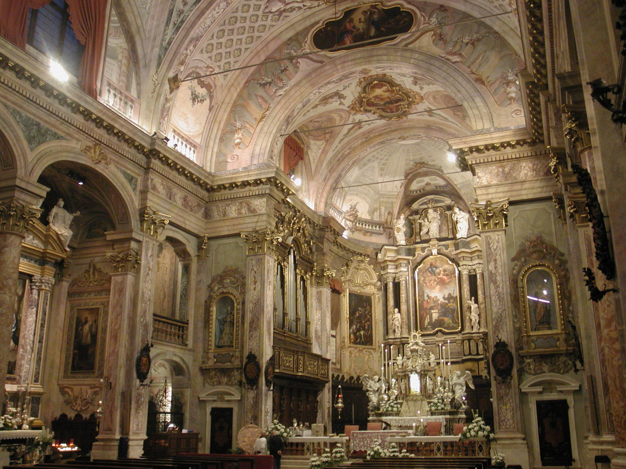 Clusone, Italy, Basilica di Santa Maria Assunta (Clusone)